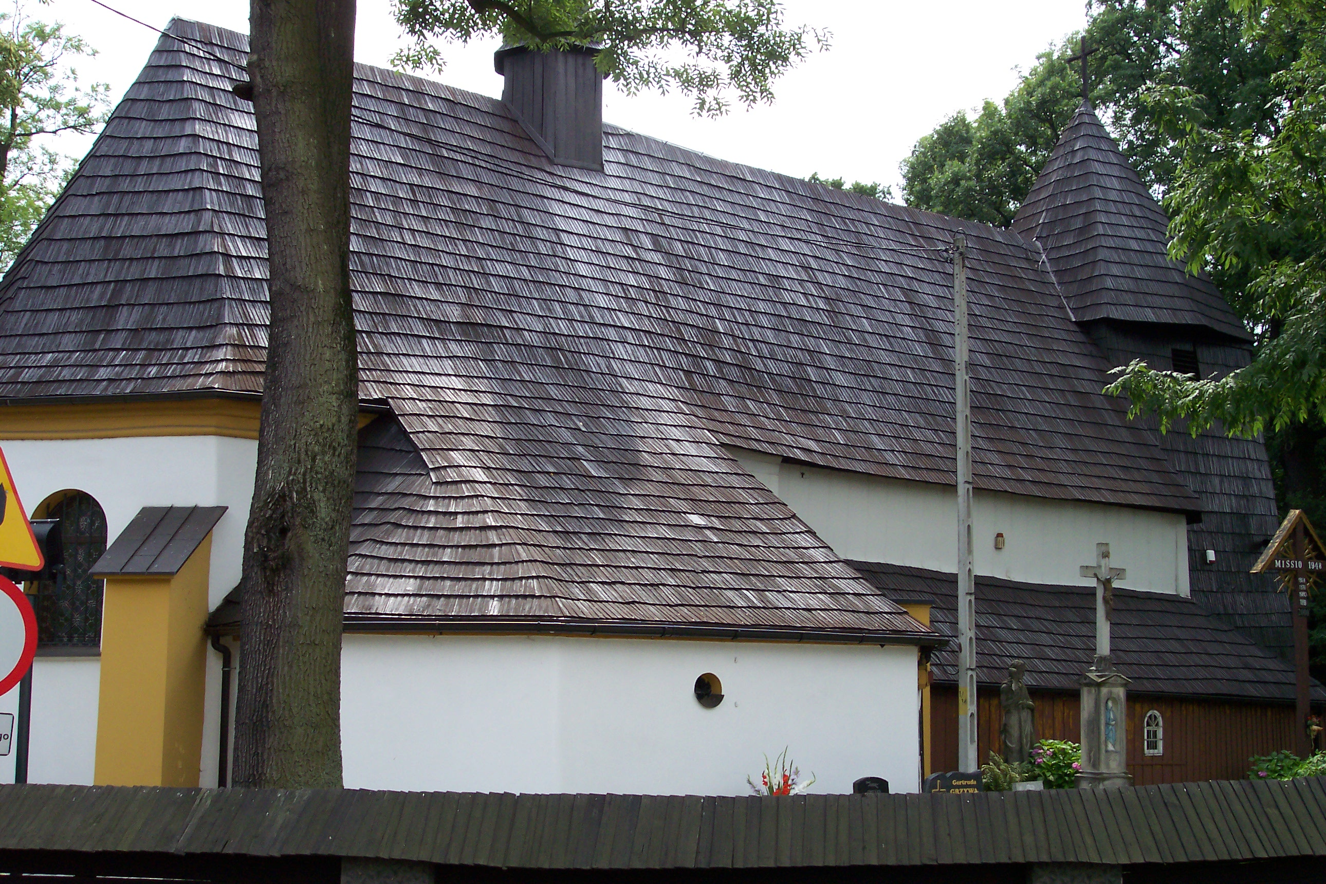 Kościół Świętej Trójcy w Rachowicach